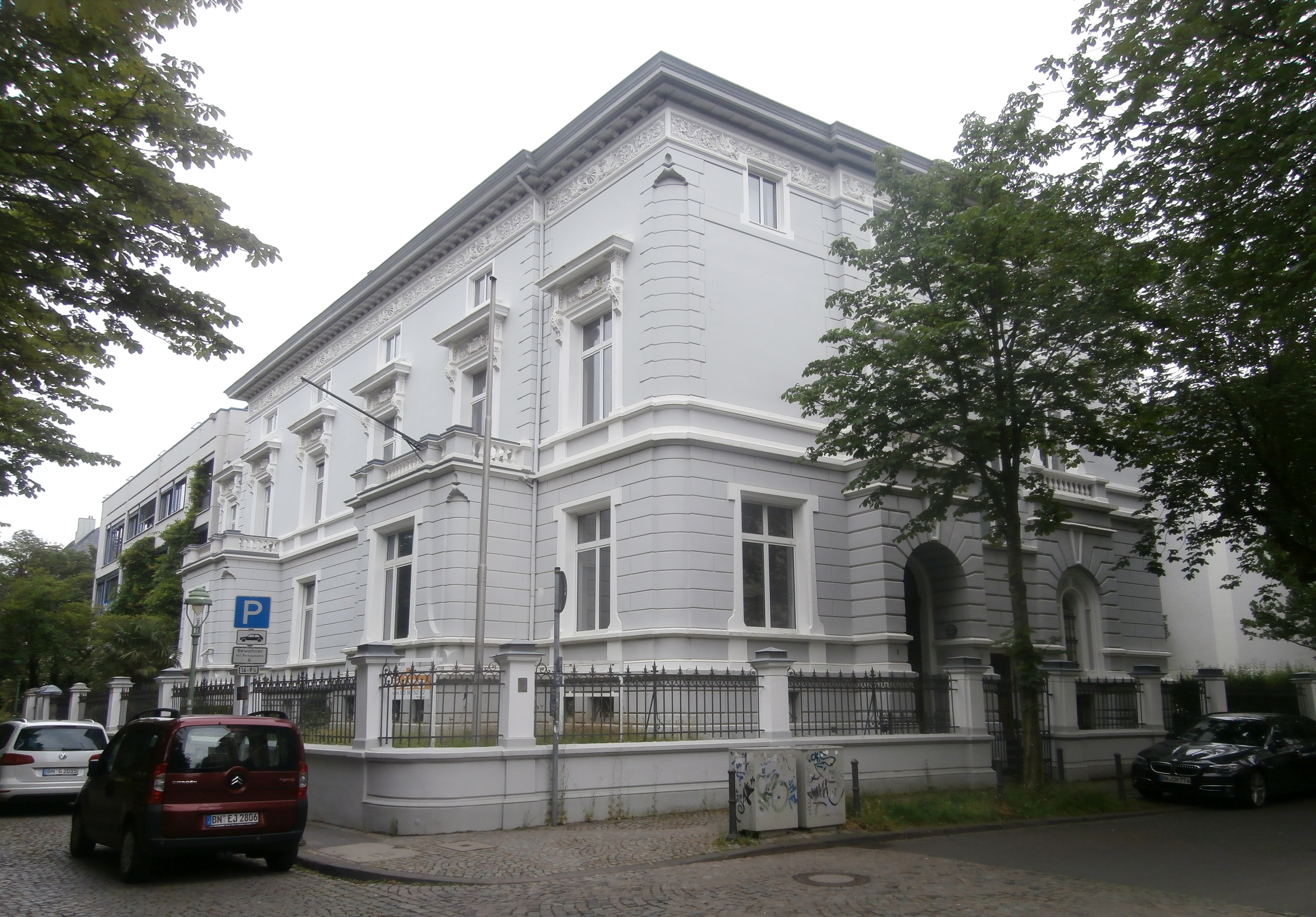 Denkmalgeschützte Doppelvilla, Poppelsdorfer Allee 51/Argelanderstraße 1, Bonn-Südstadt